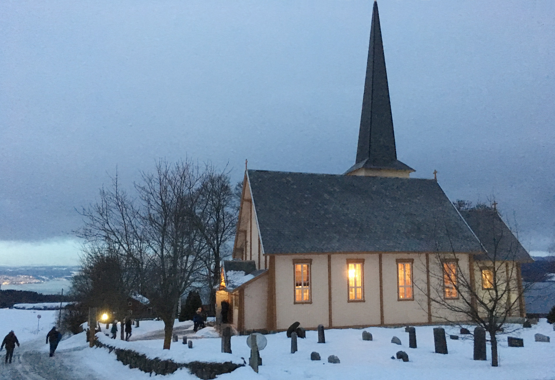 Kirken etter ytre restaurering og med visstnok opprinnelig farge.